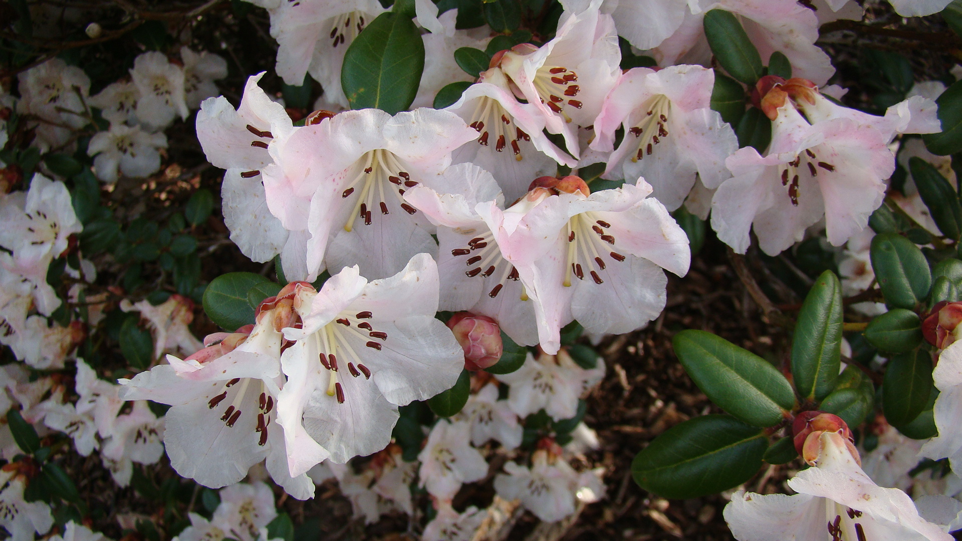 Rhododendron moupinsense at UBC Botanical Garden